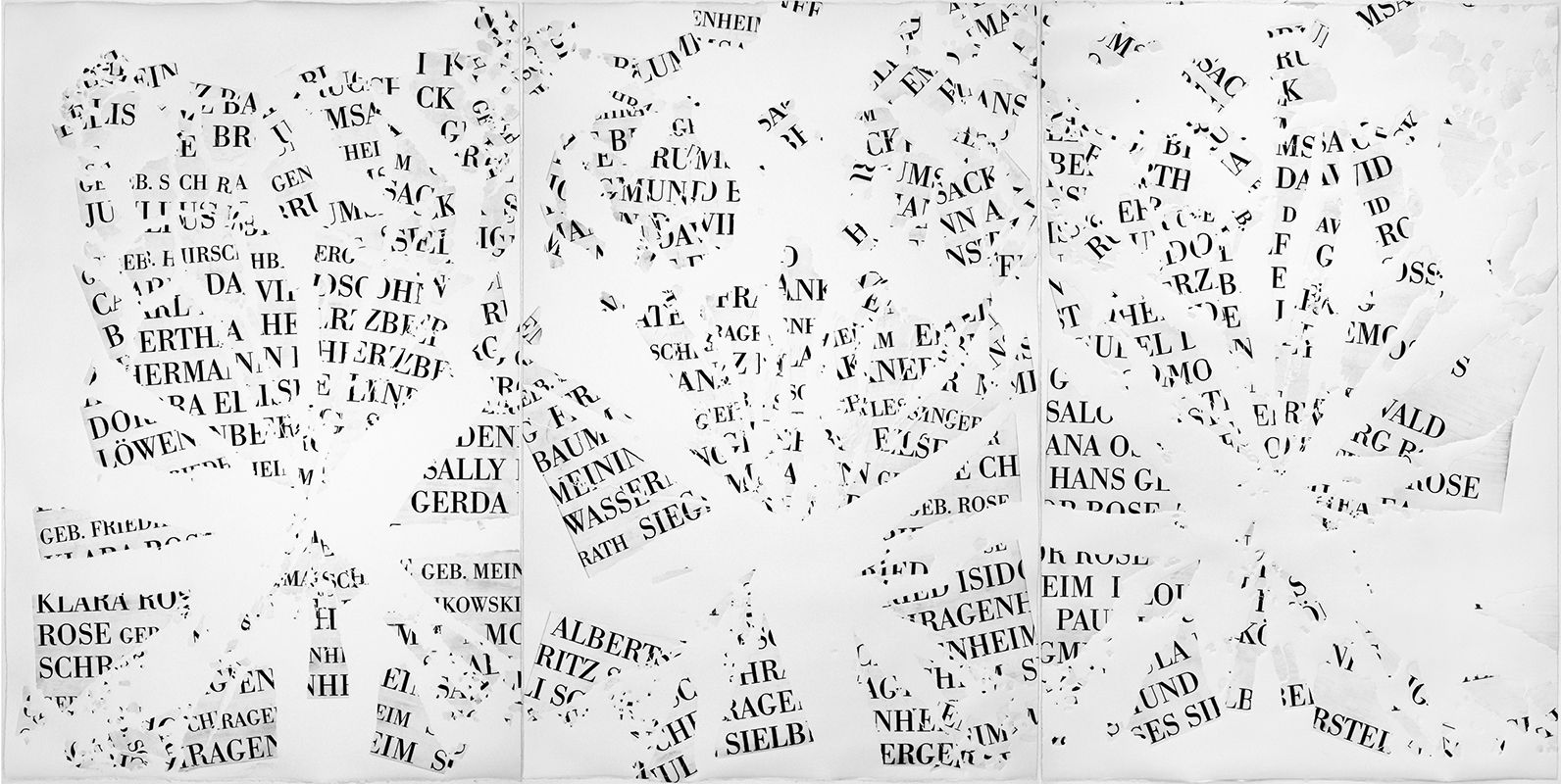 Gedenktafel für die ermordeten Juden aus Sehnde vor dem Ratssaal - erstellt von der Künstlerin Rahel Bruns / Die Namenstafel aus Glas wurde zerschlagen und als Mahnmal erstellt.